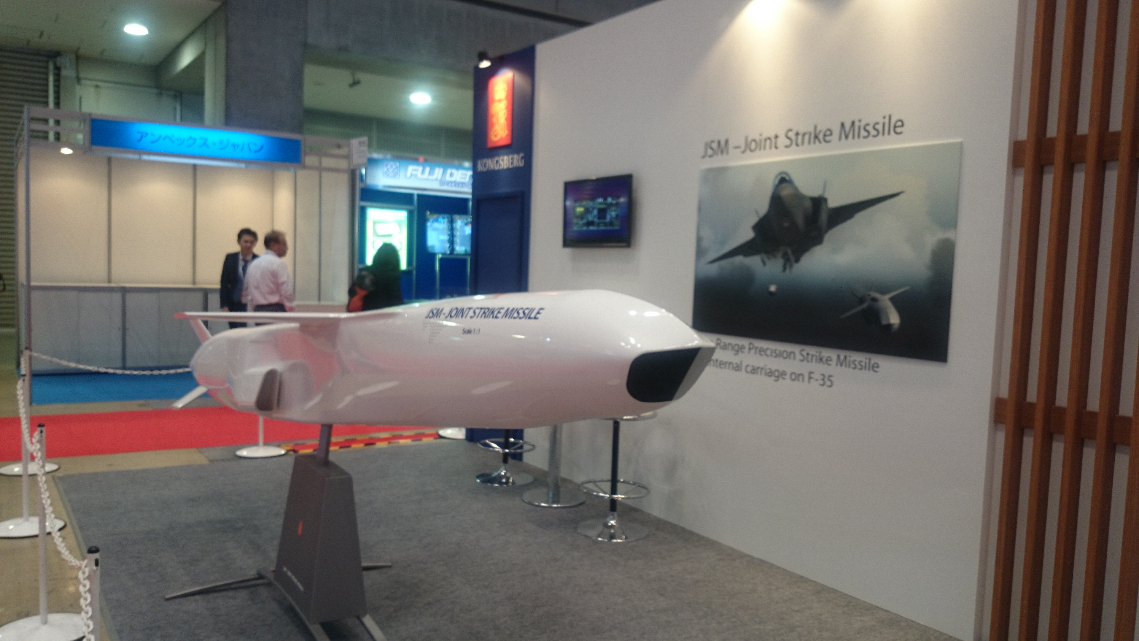 JSM Mockup